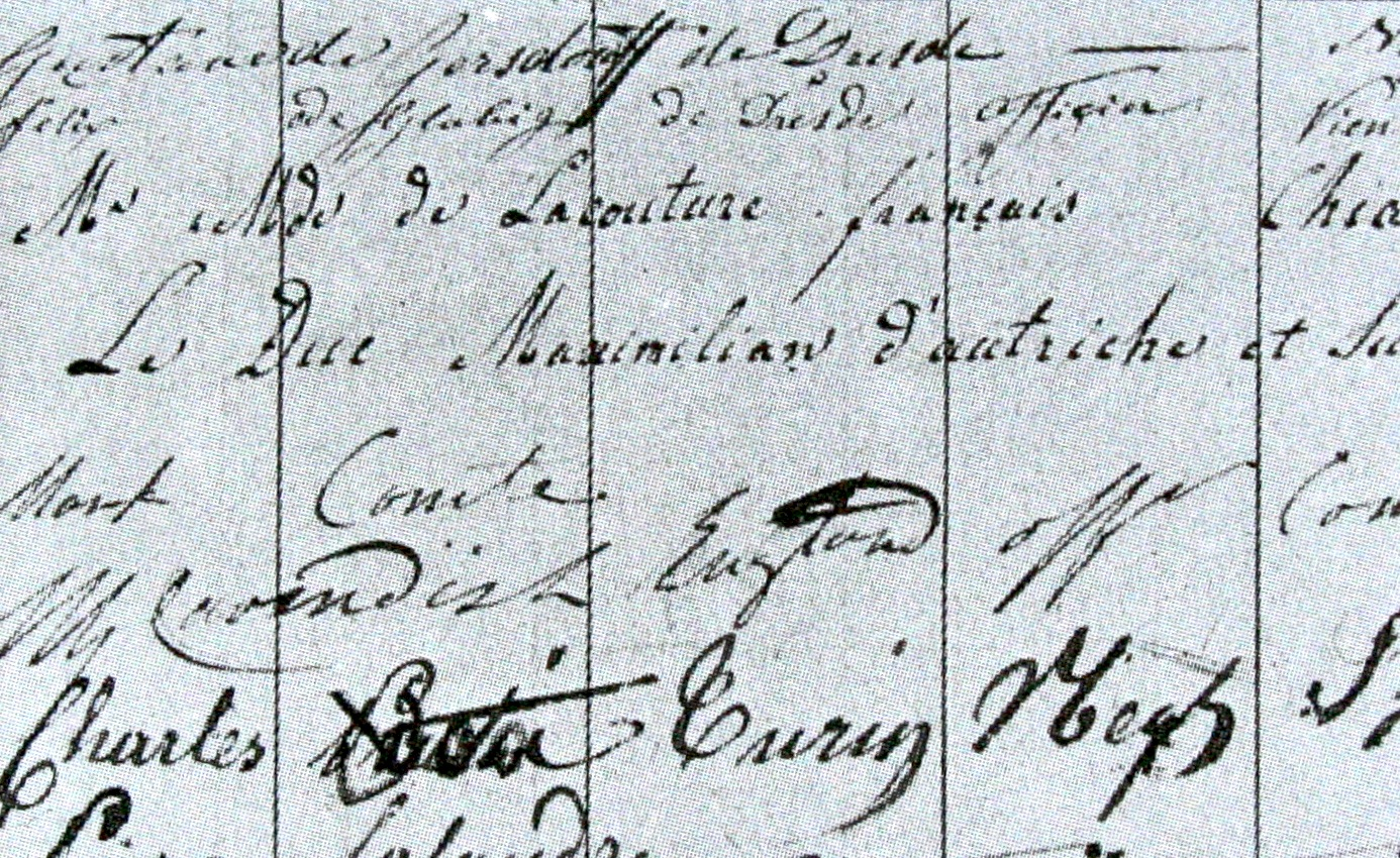 Hotel Bodenhaus in Splügen Gästebuch: Erzherzog Ferdinand Maximilian von Österreich